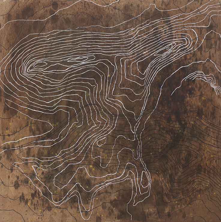 dibuix sobre fusta tractada amb nogalina i òxit